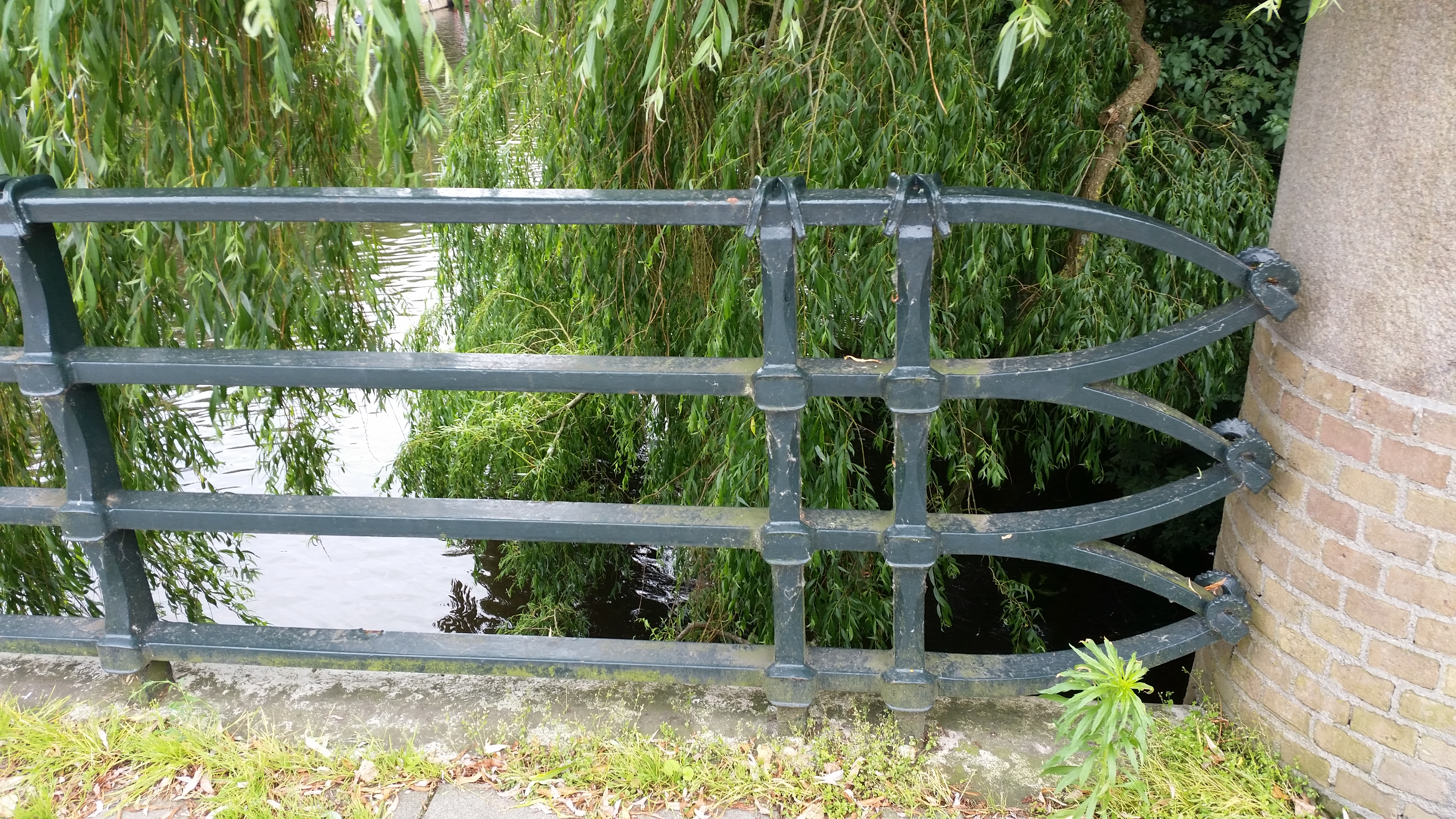 Brug 422 in de Diepenbrockstraat over de Boerenwetering, Amsterdam-Zuid, detail van leuning op de overspanning